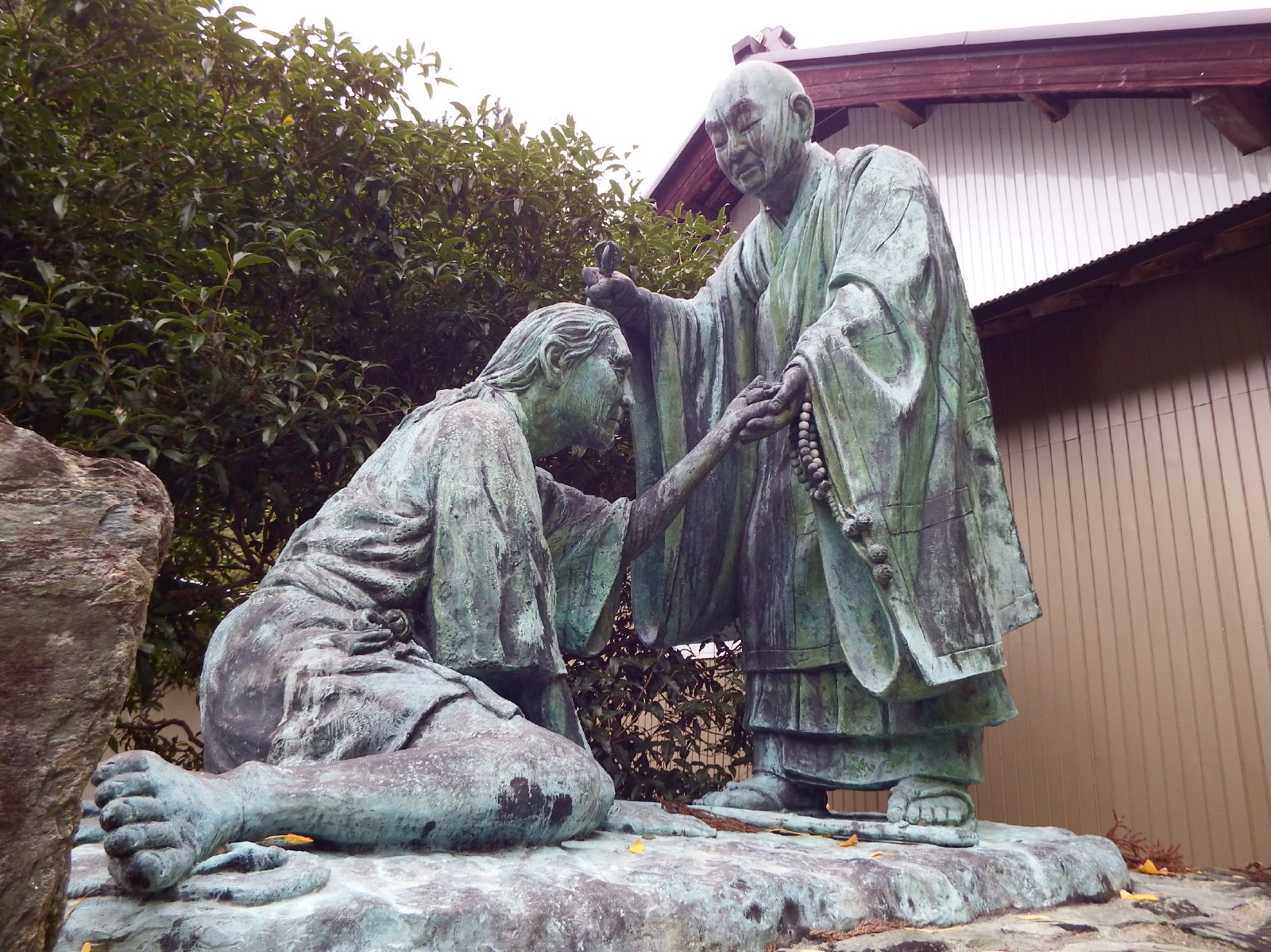 杖杉庵の空海と衛門三郎像